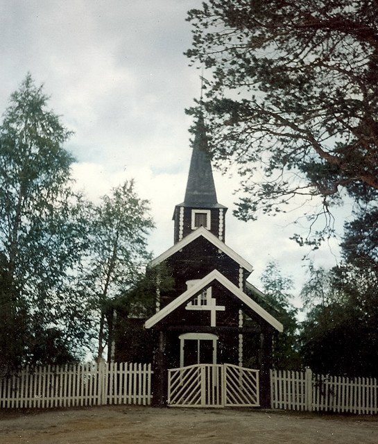 Sømådalen kirke